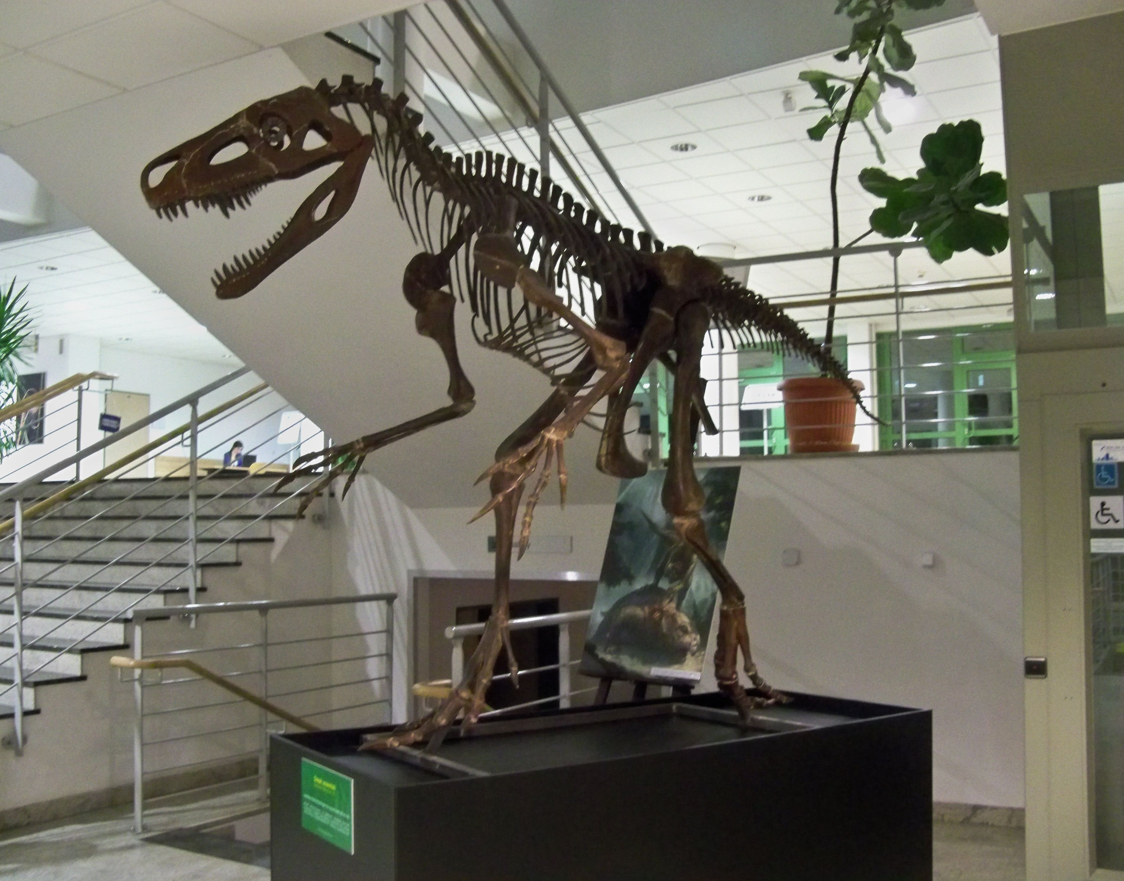 Rekonstrukcja szkieletu smoka wawelskiego (gatunku dinozaura) w gmachu Wydziału Biologii Uniwersytetu Warszawskiego